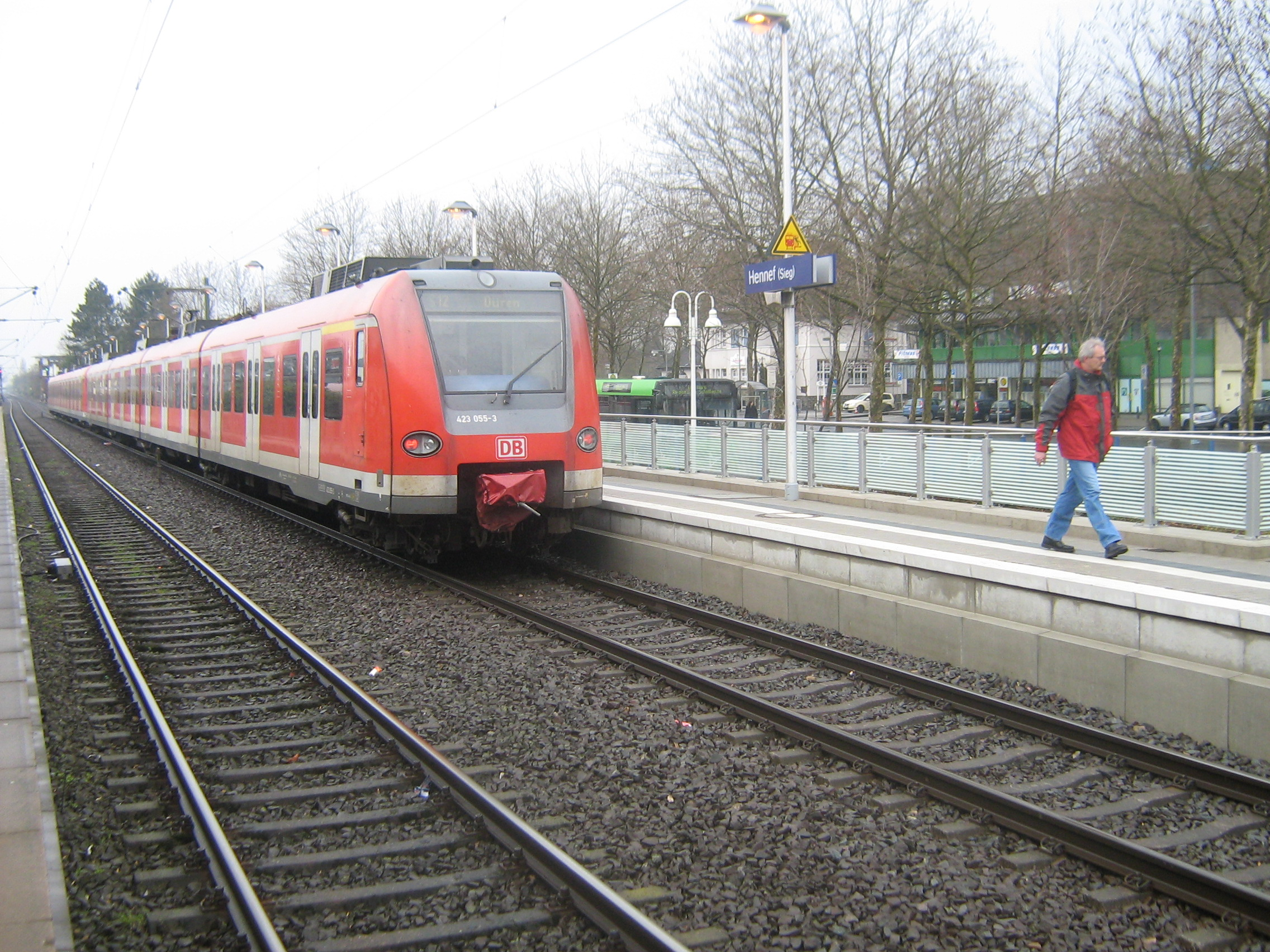 S12 in Hennef